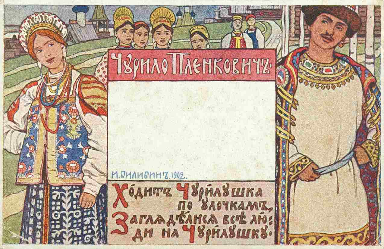 Чурило Пленкович (из серии "Богатыри") 1902. Открытка издания "Общины св. Евгении". №214.